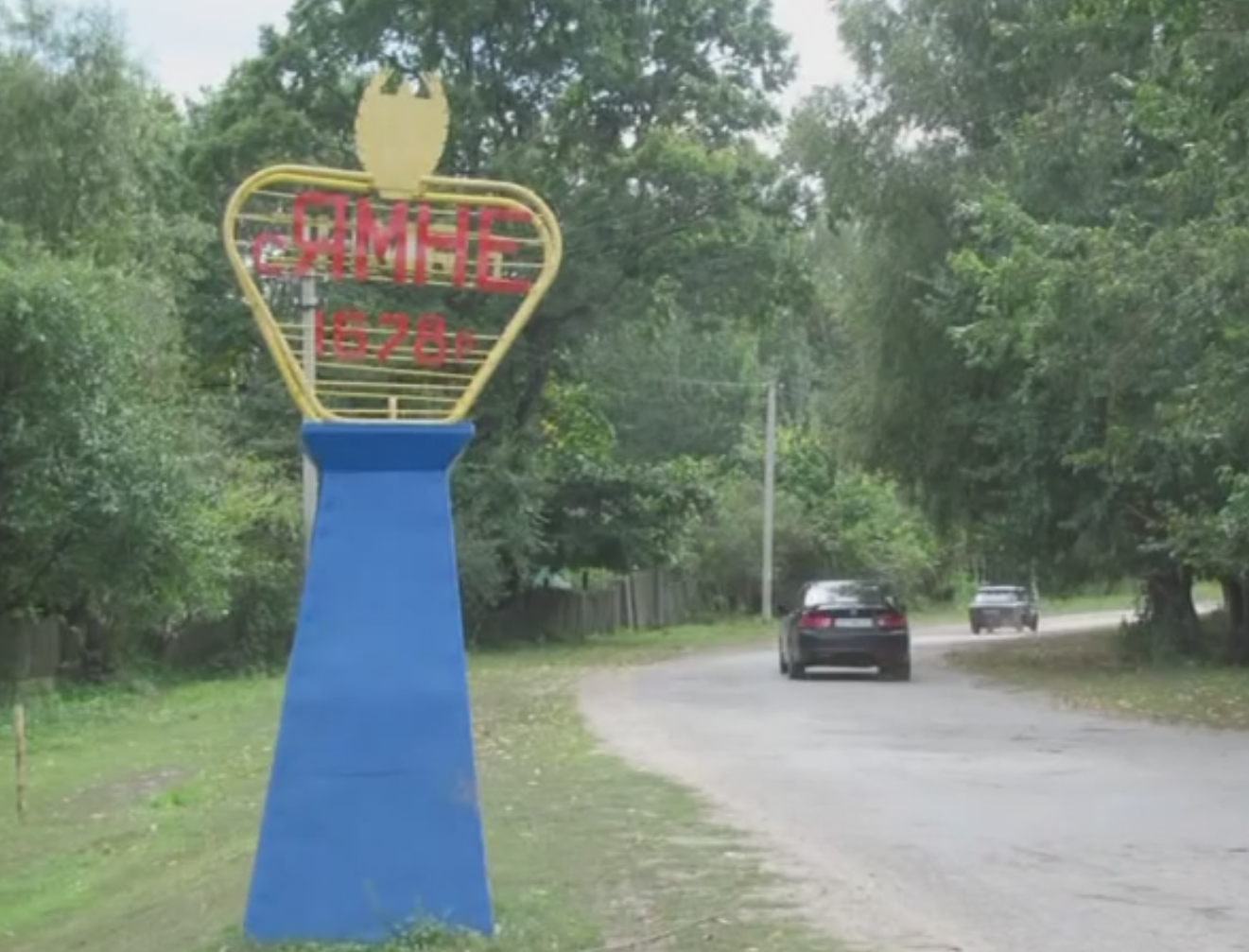 Ямне на вїзді в село